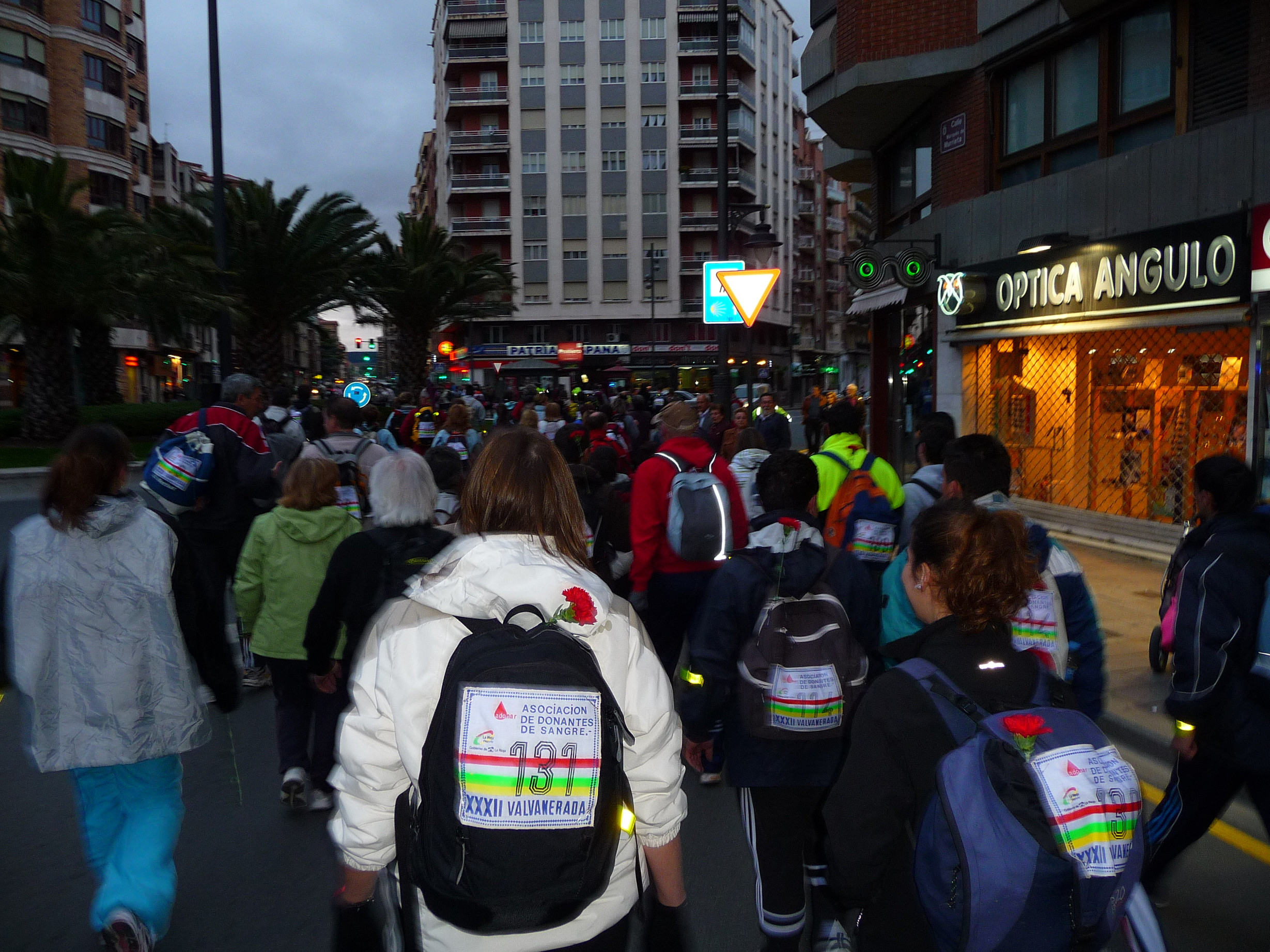 Caminantes saliendo de Logroño durante la Valvanerada.